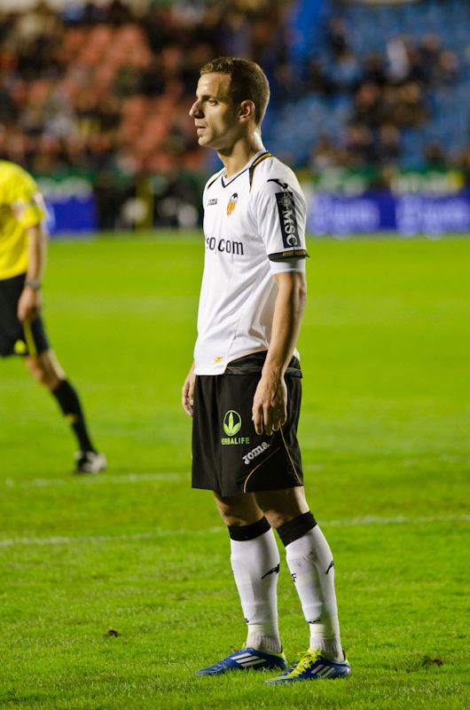 Fotografía de Carlos RM de Roberto Soldado jugando contra el Levante.